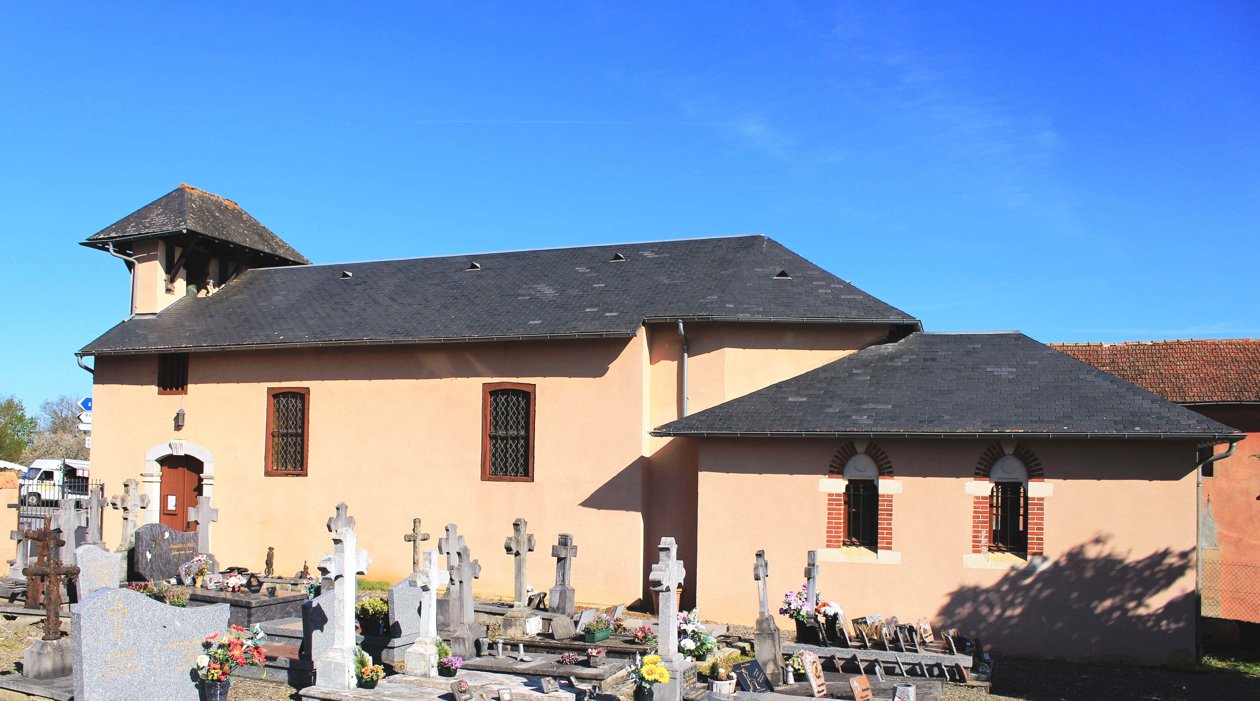 Église Saint-Barthélémy de Boulin (Hautes-Pyrénées)